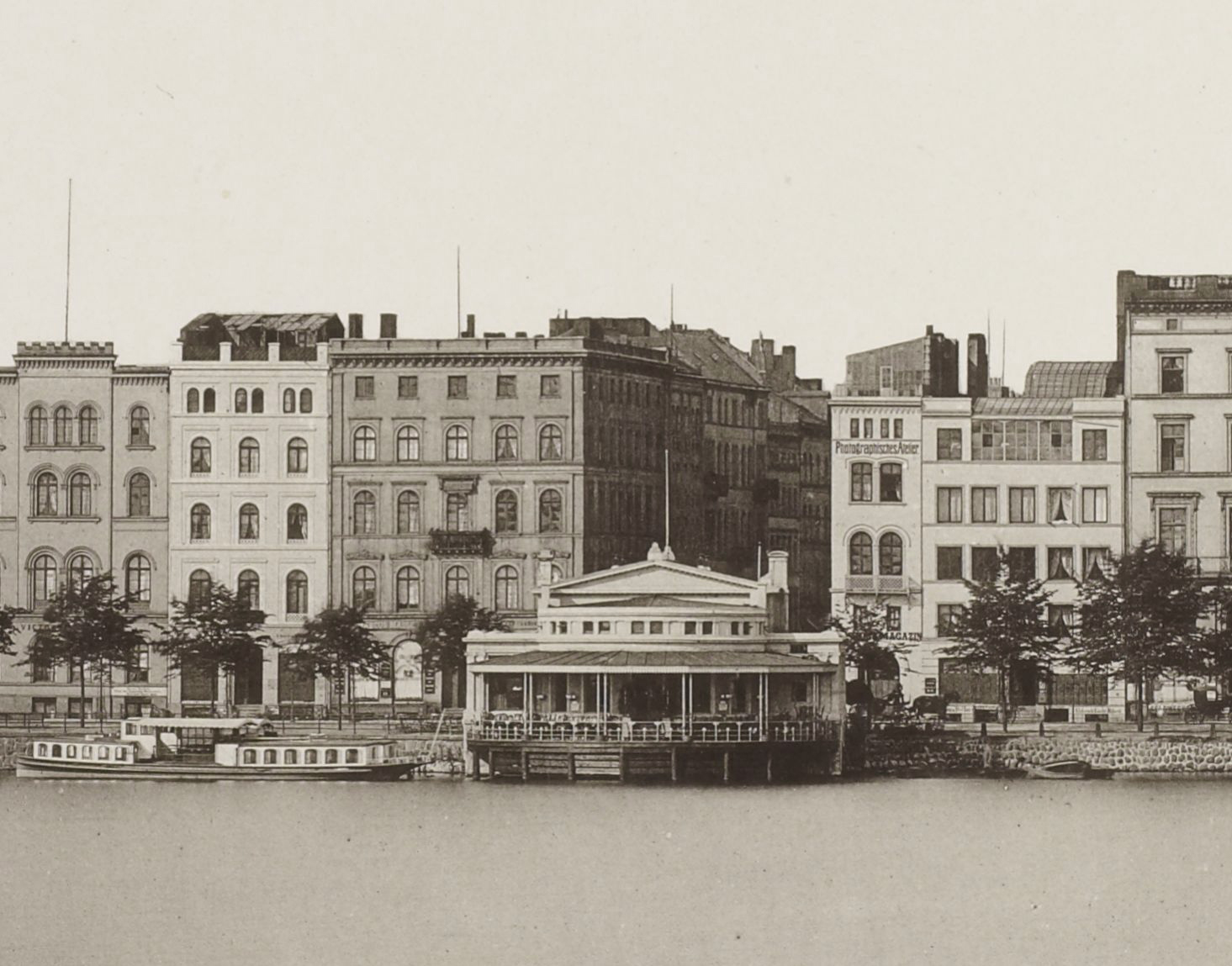 Bildausschnitt aus “Der alte Jungfernstieg”. Inhalt einer Bildmappe “Hamburg” mit 32 Photodrucken.